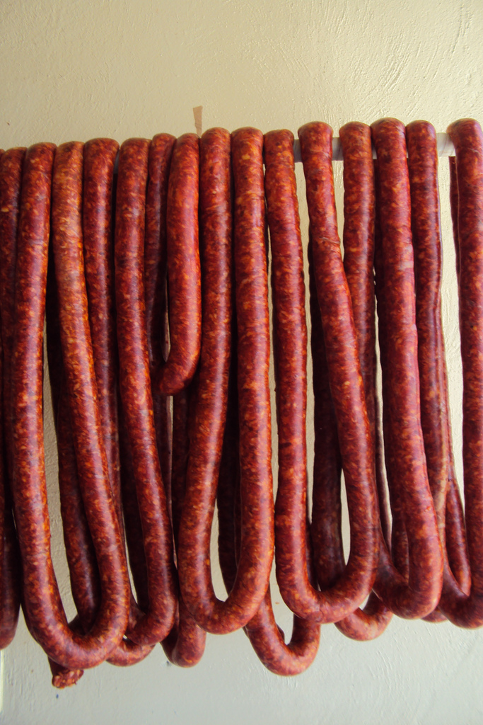 Chorizo Toluqueño.